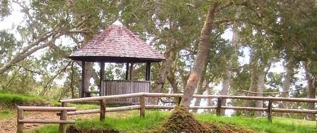 Rondavelle de pique-nique située dans les hauts du Tévelave.